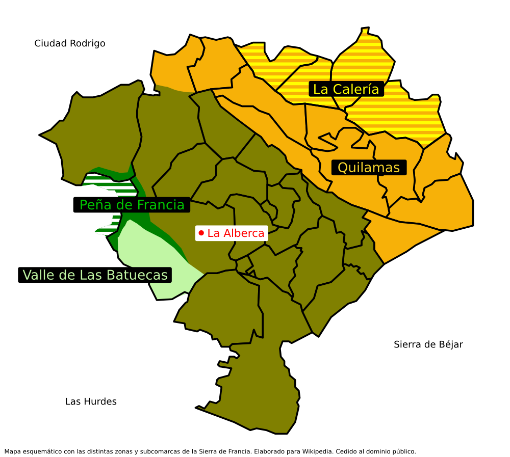 Mapa esquemático de las distintas zonas y subcomarcas de la comarca de la Sierra de Francia, en la provincia de Salamanca, España.